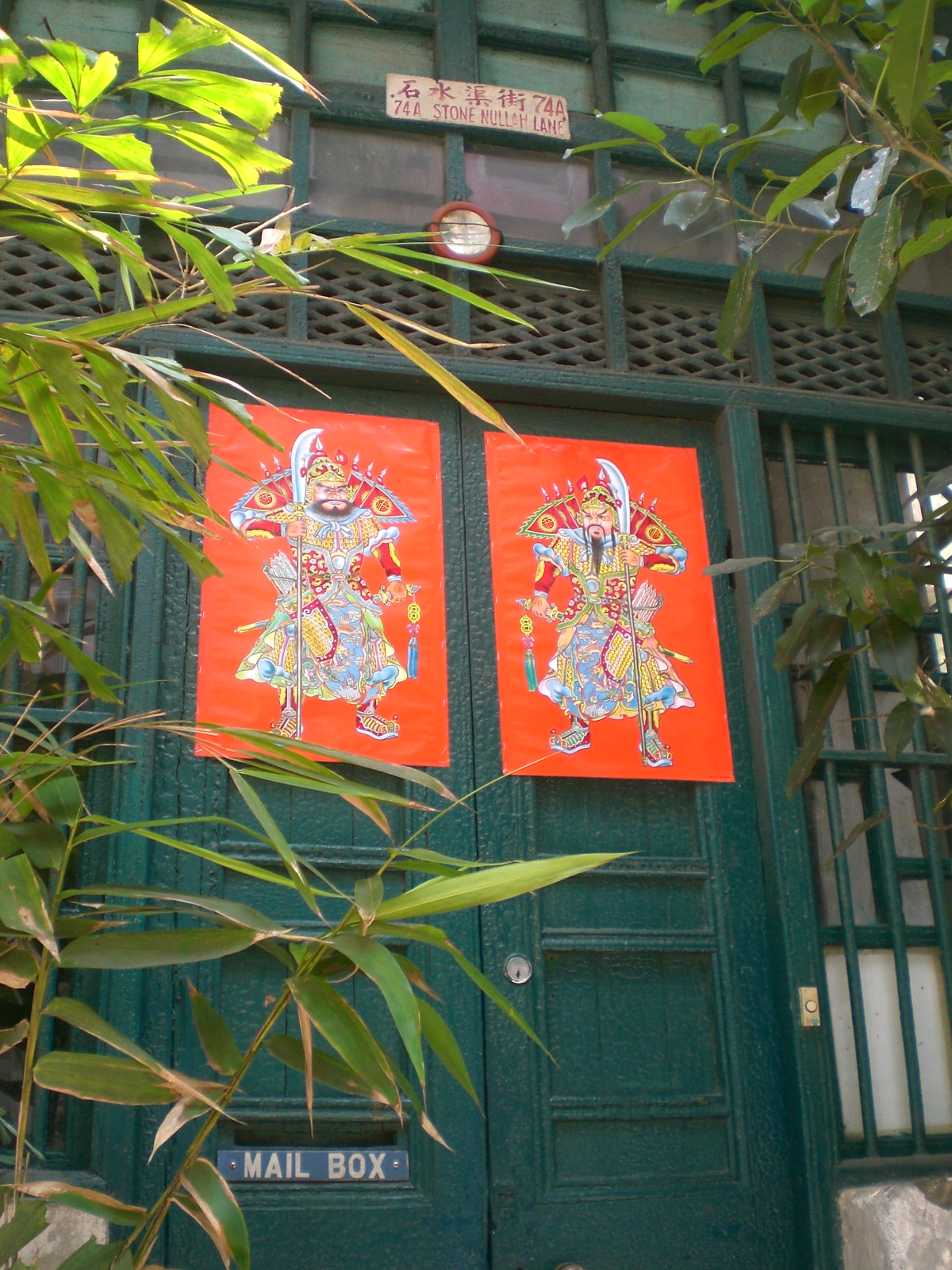 石水渠街藍屋